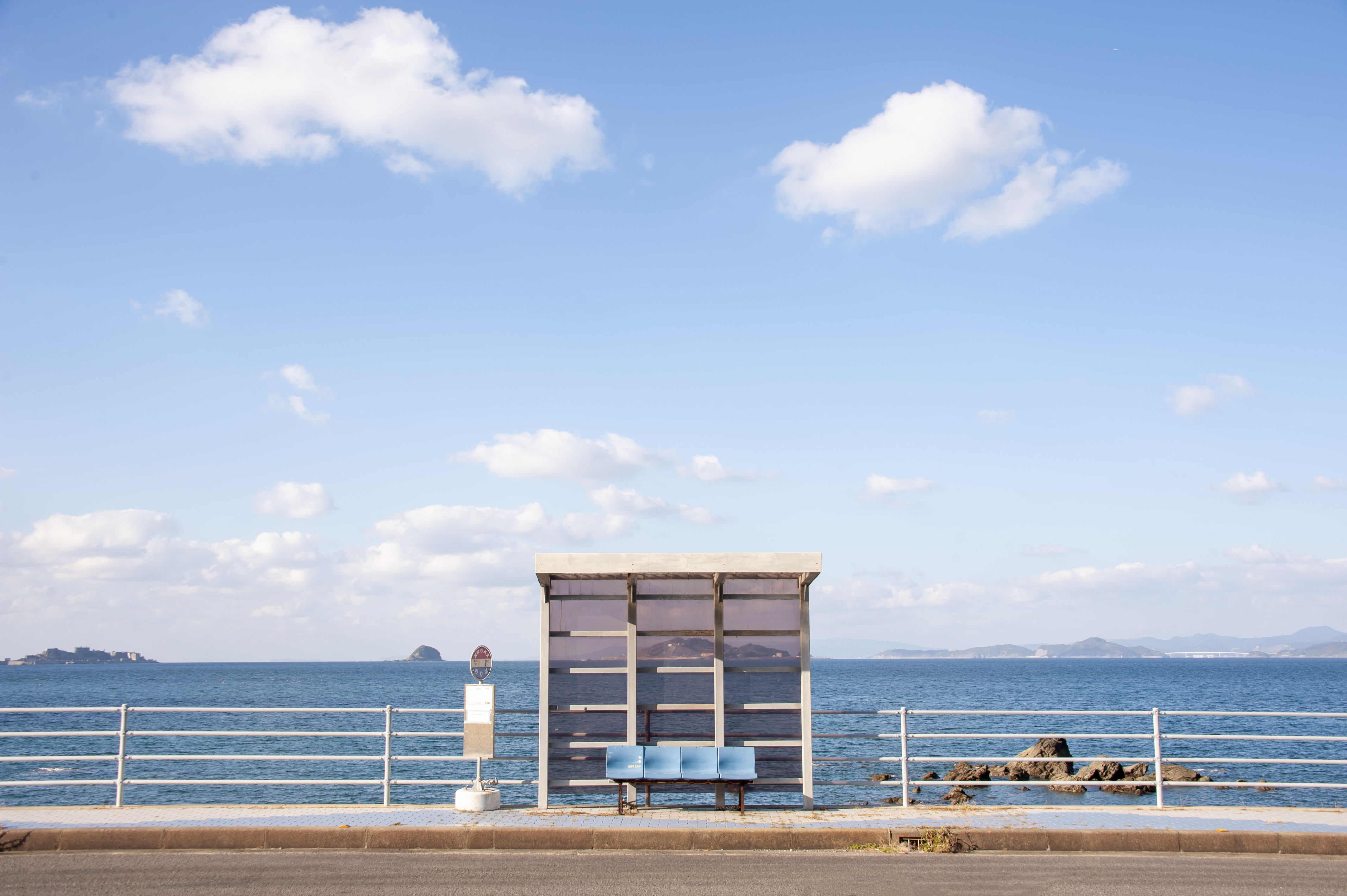 長崎バス南越（なんごし）バス停